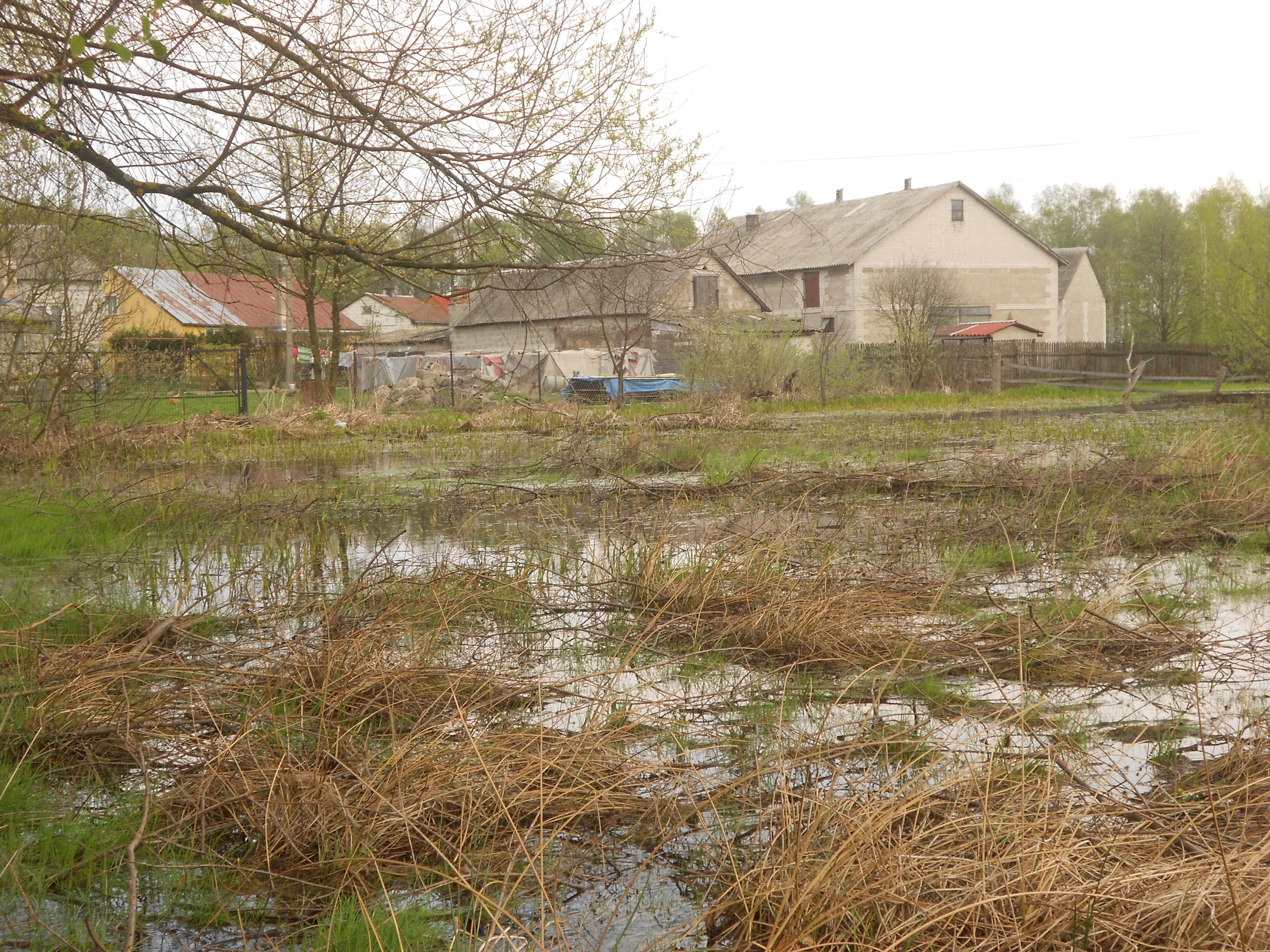 Świdno zalane podczas wiosennych opadów